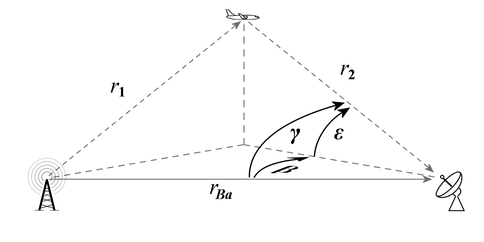 Koordinatenbestimmung mit bistatischem Radar